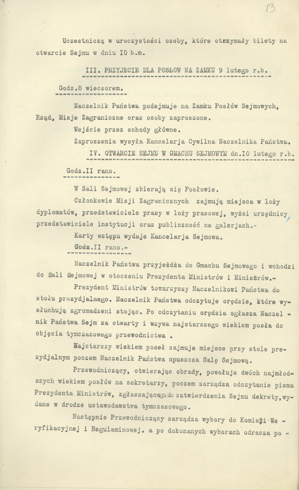 Porządek uroczystości otwarcia Sejmu Ustawodawczego